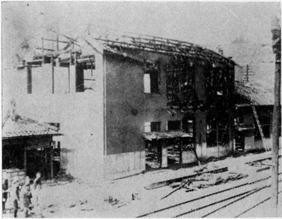 昭和18年5月30日、漏電のため焼失した和田山駅本屋。